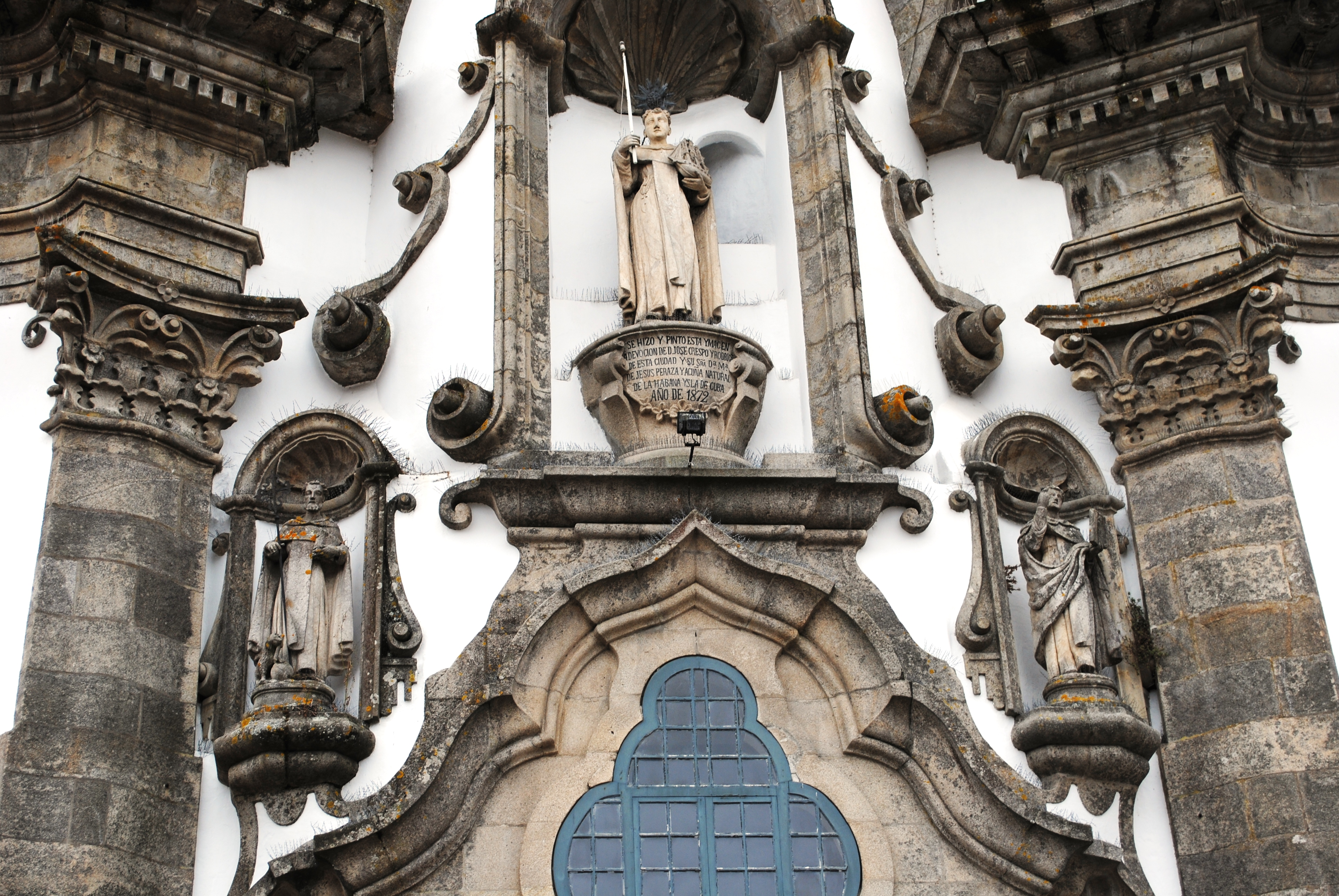 Tui, capela de S. Telmo, detalle